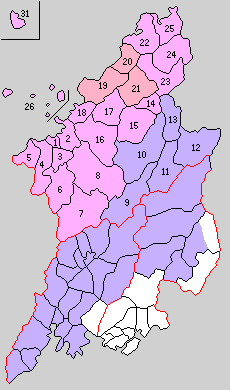 後の山口県阿武郡域の町村制時点の町村。